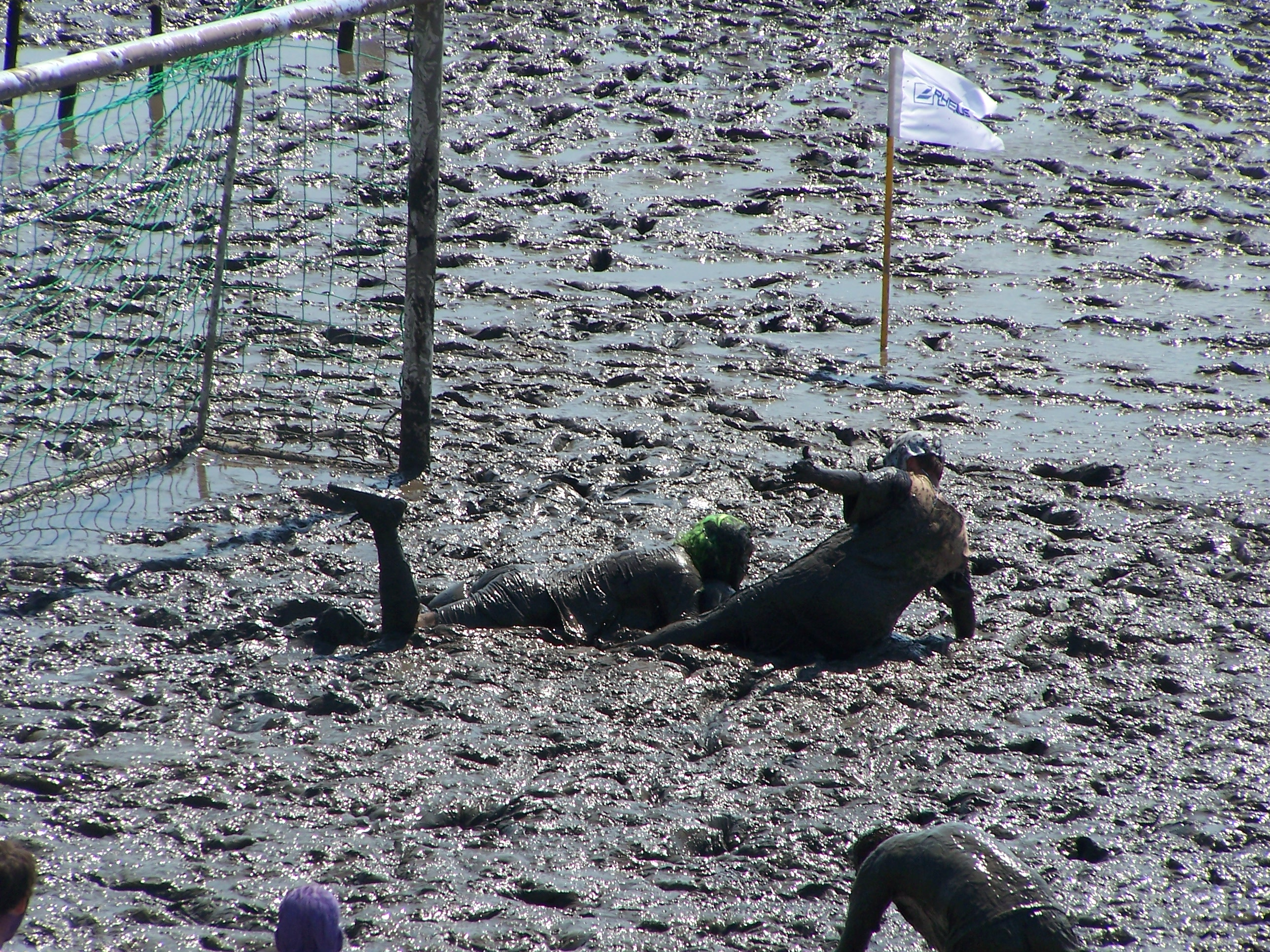 Brunsbüttels Touristen-Attraktion "Wattolümpiade"